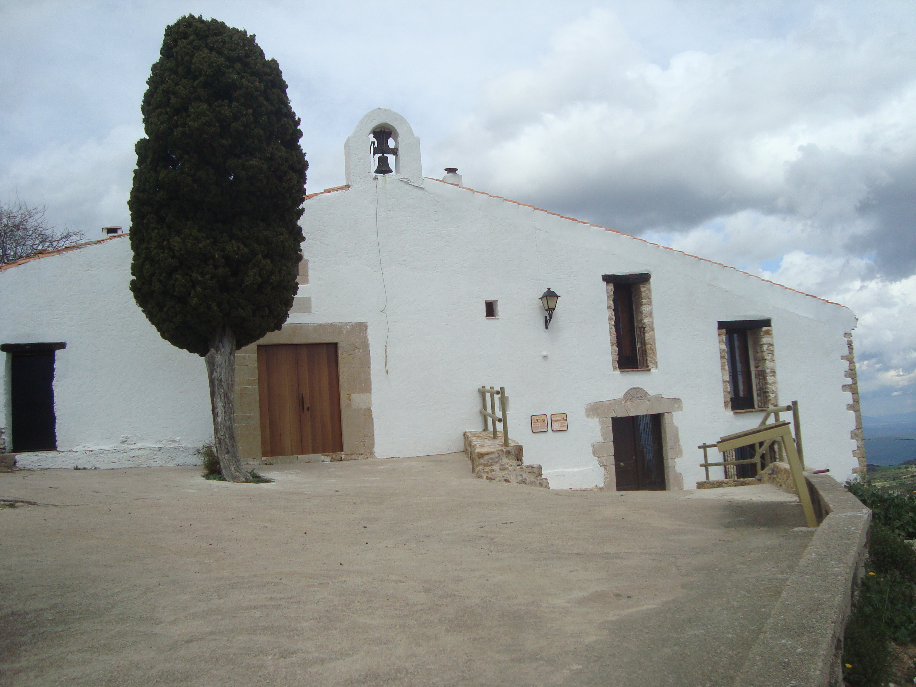 Ermita de Sant Joan Nepomucè (la Serratella) 05.103-002.